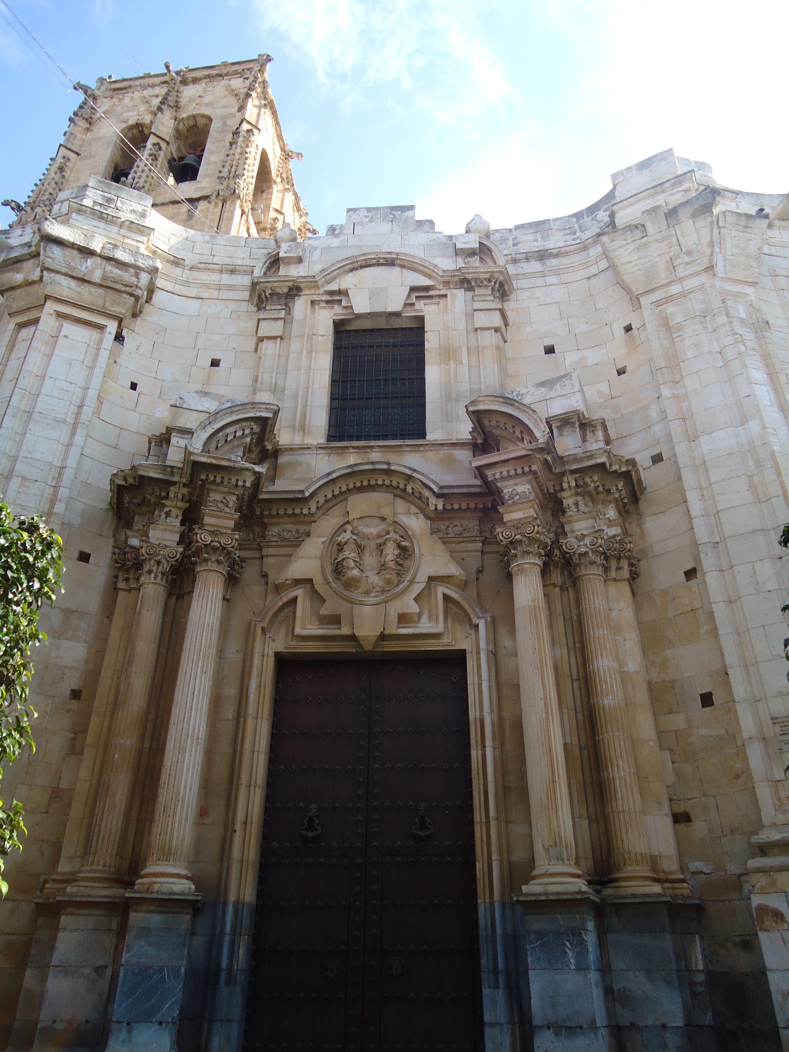 Portada principal de la iglesia de las santas Justa y Rufina, Orihuela (España)